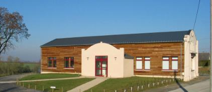 Salle des fêtes